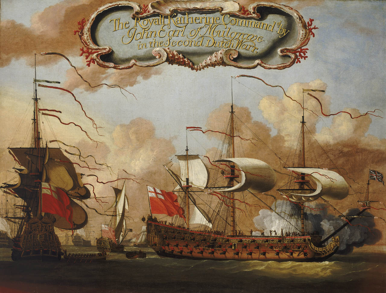 Peinture représentant le vaisseau britannique HMS Royal Katherine, lancé en 1664.